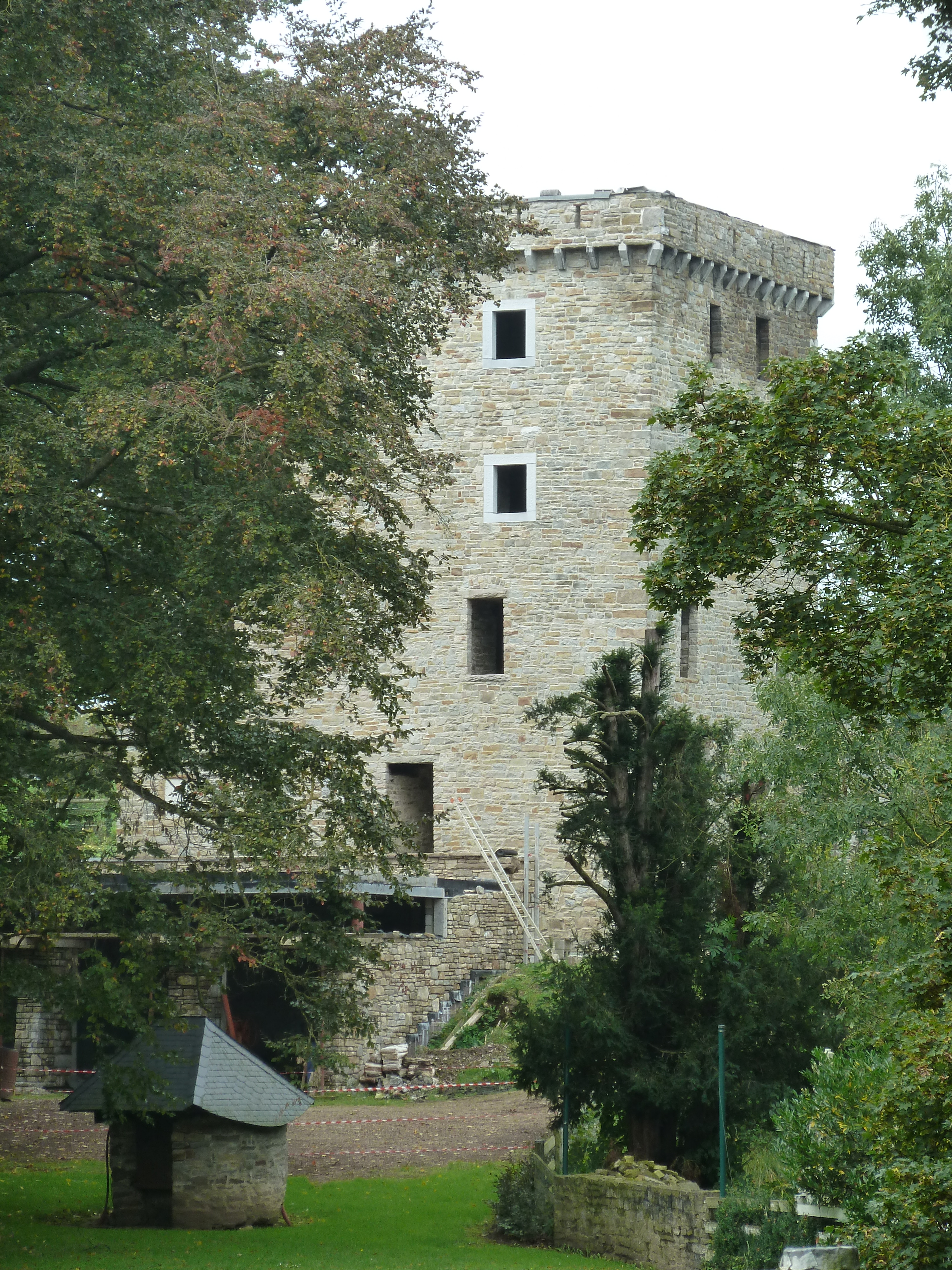 Château d'Alensberg, Plombières, Belgique